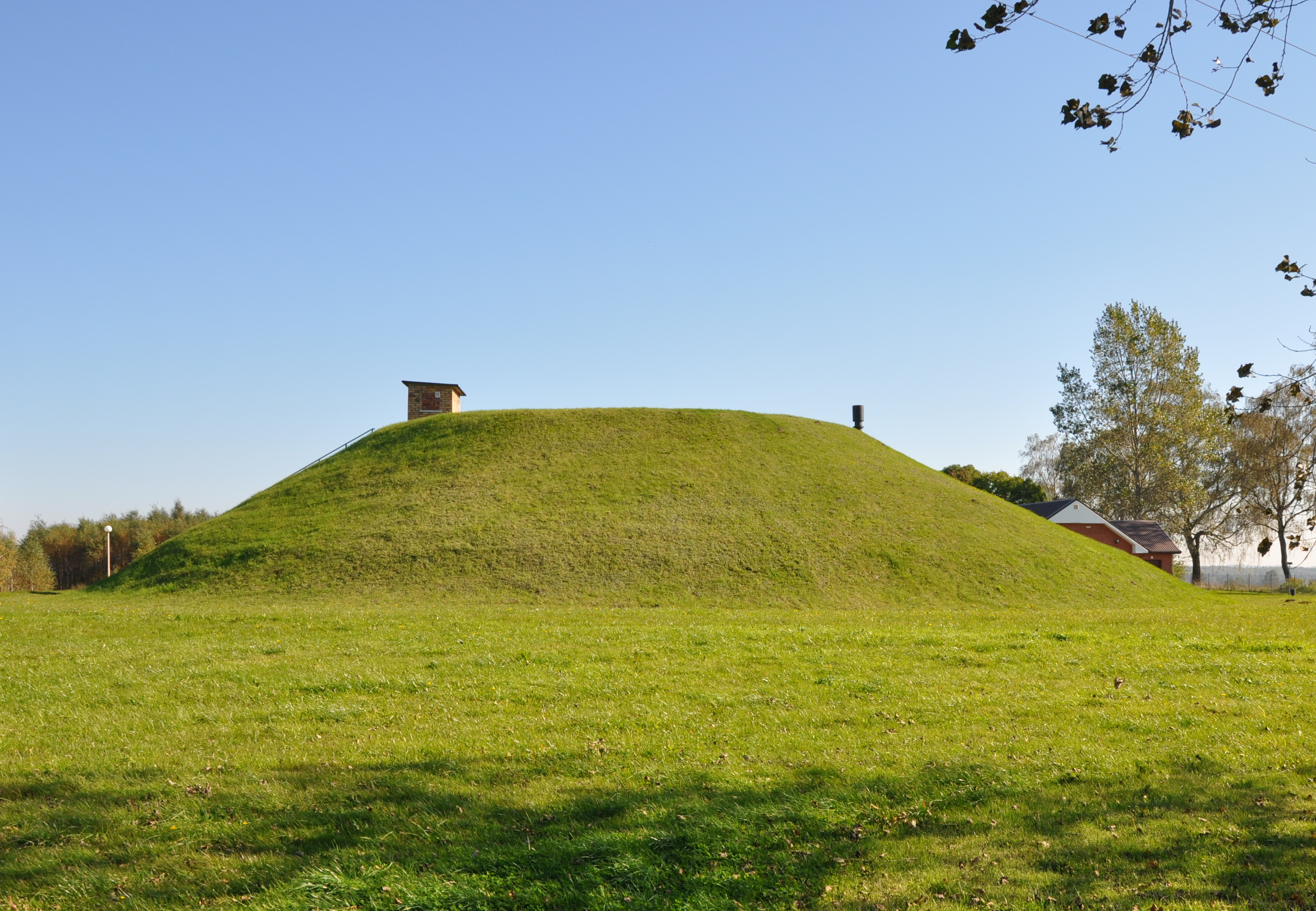 Wierzchołek Lubieszowskiej Góry od strony zachodniej, będący punktem ujęcia wody